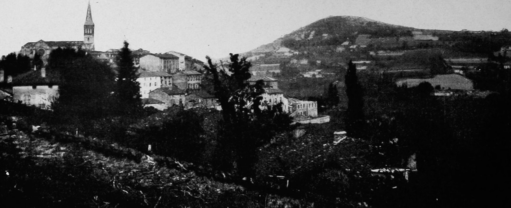 Dictionnaire illustré des communes du département du Rhône. Tome 2 / par MM. E. de Rolland et D. Clouzet.